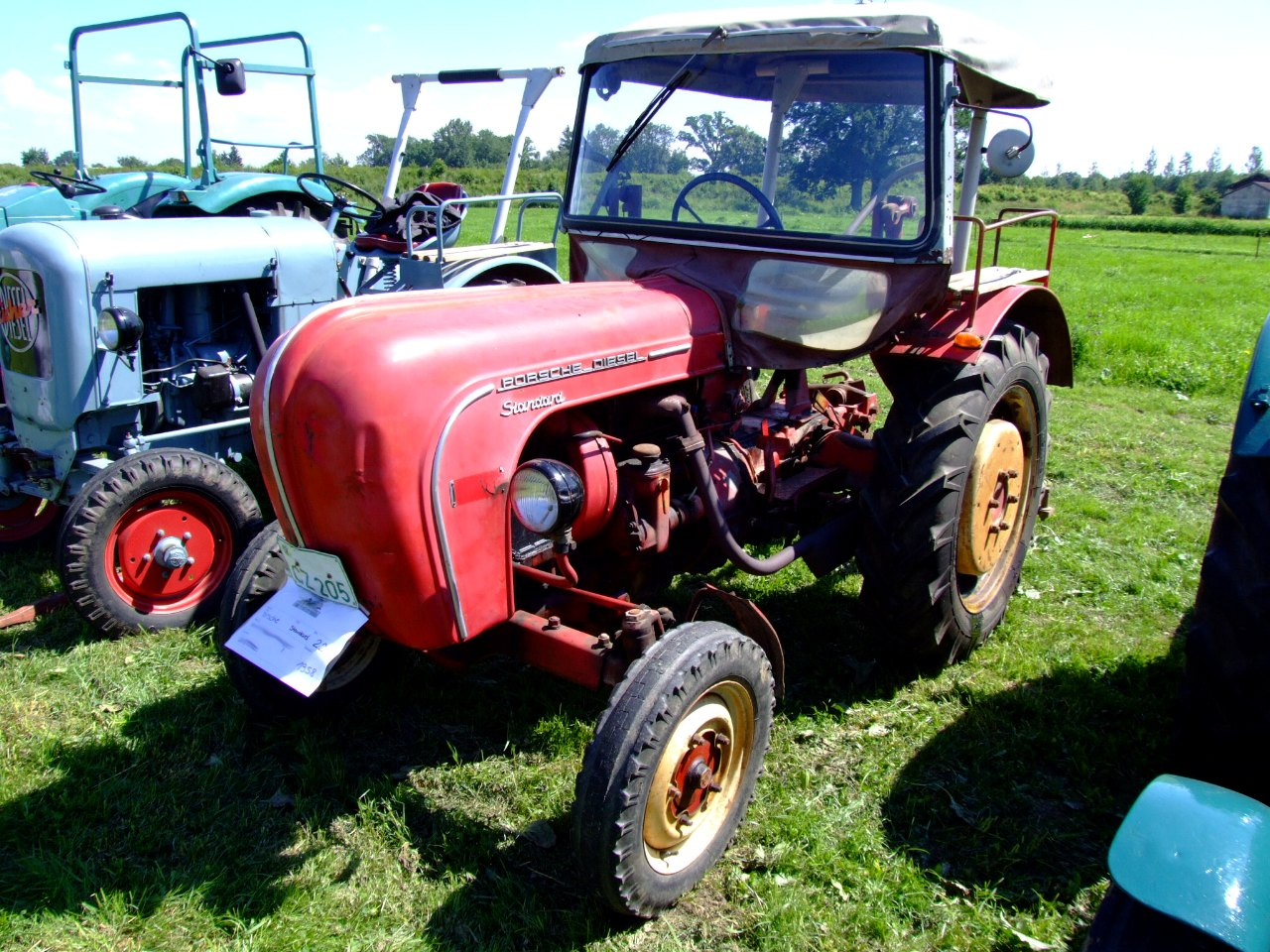 Porsche-Diesel Standard mit 22 PS, Baujahr 1958